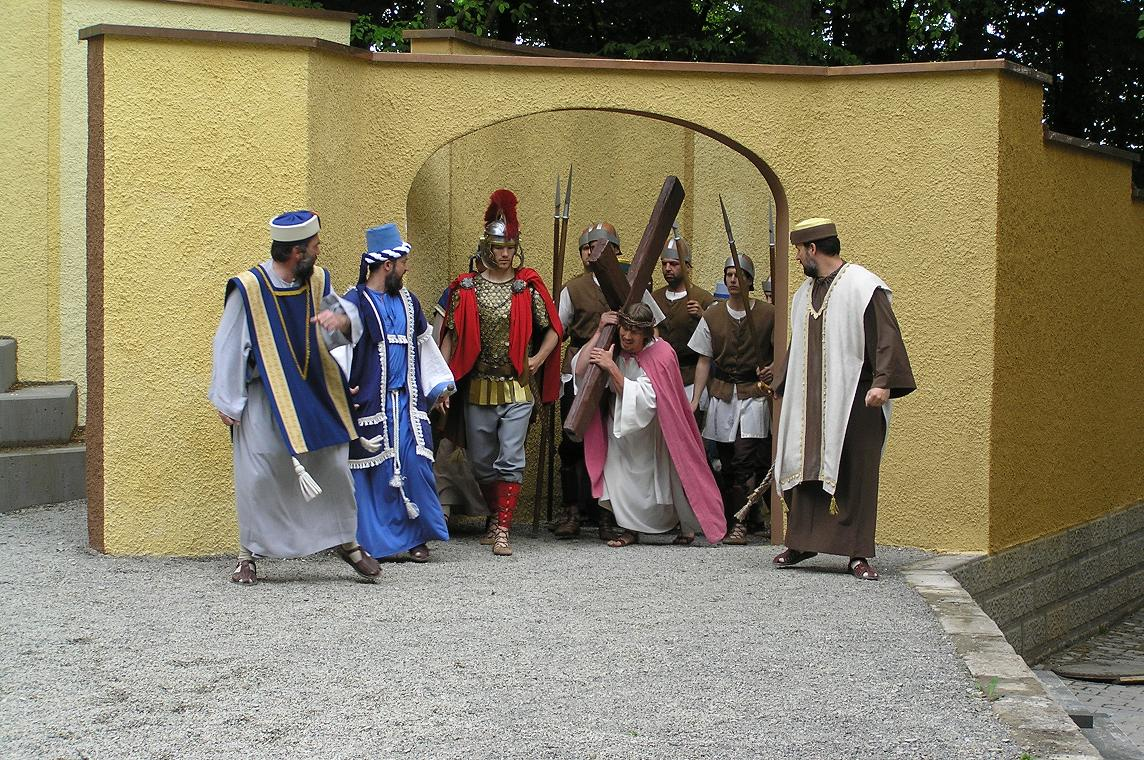 Jesus kurz vor seiner Kreuzigung